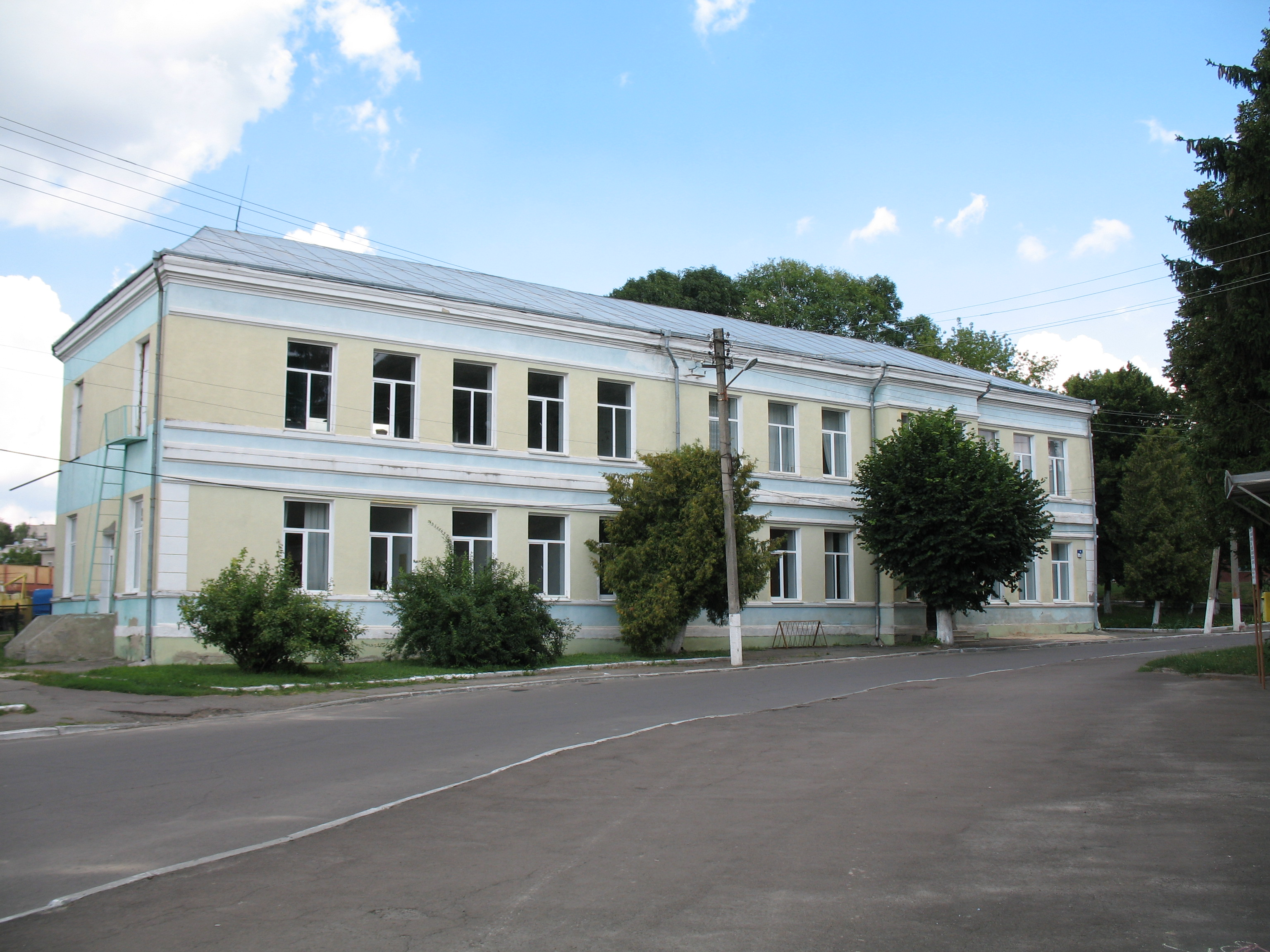 Володимир Волинський. Колишнє приміщення міської думи та управи